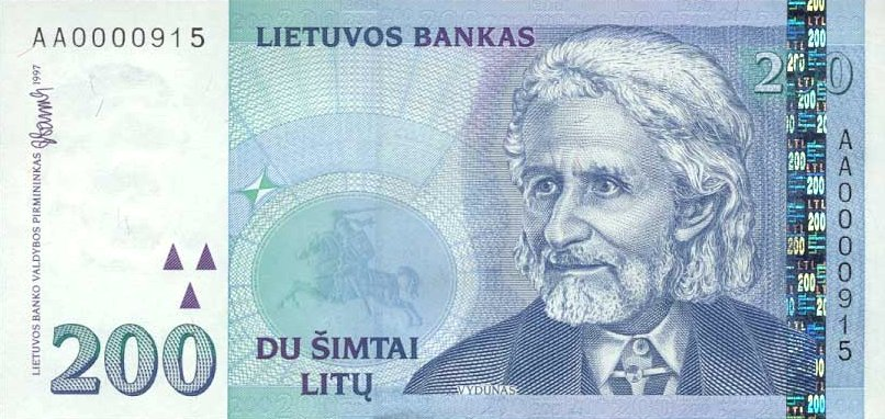 Lithuania 200 litu 1997